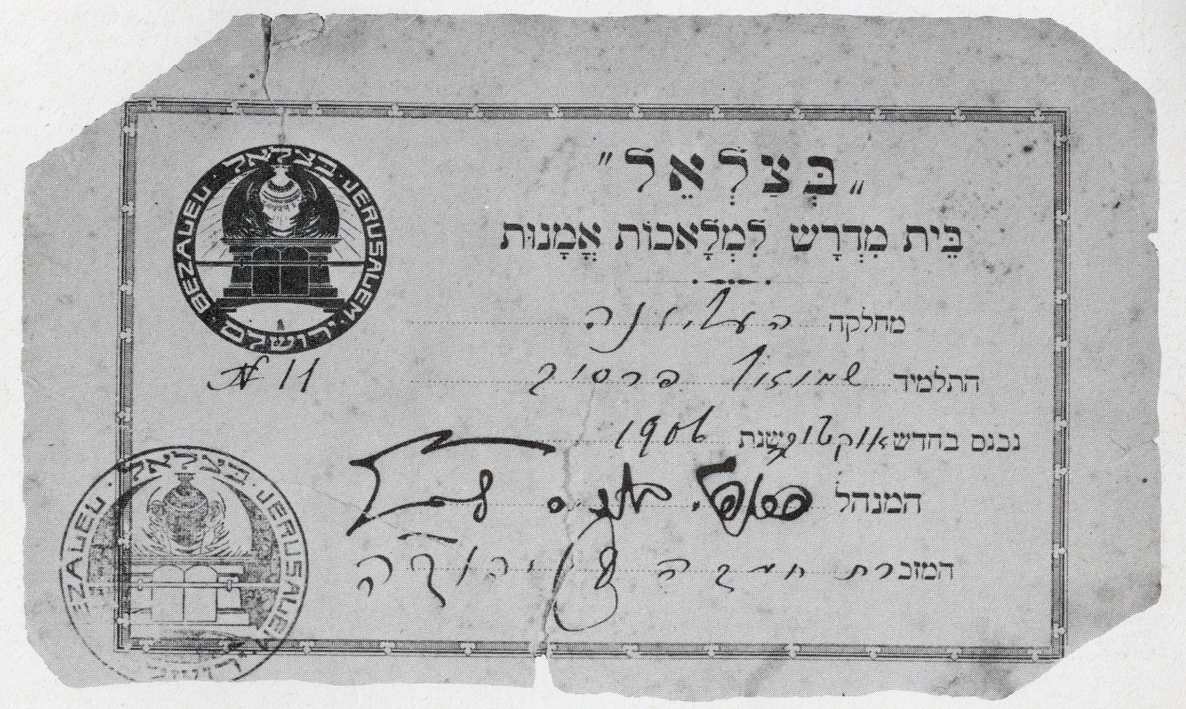 כרטיס של תלמיד בצלאל שמואל פרסוב. 1906. אוסף מוזיאון ישראל, מתנת תמר תמיר, ערד.